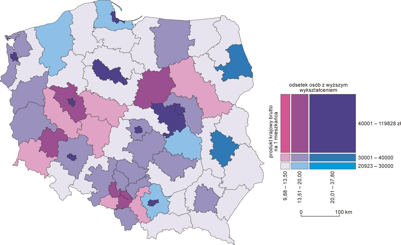 Kartogram złożony: przykład kartogramu powstałego poprzez nałożenie dwóch kartogramów ze skalą barwną – odsetek osób z wyższym wykształceniem i PKB na mieszkańca w podregionach w 2011 roku